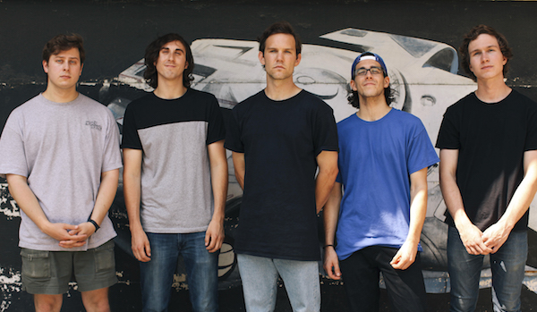 Knucle puck en 2015